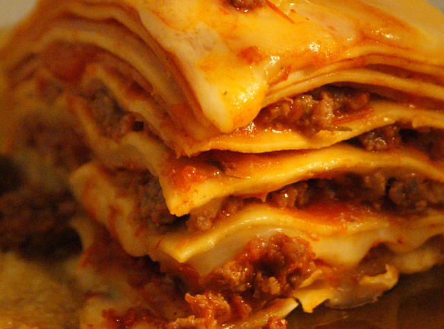 Lasagne closeup.